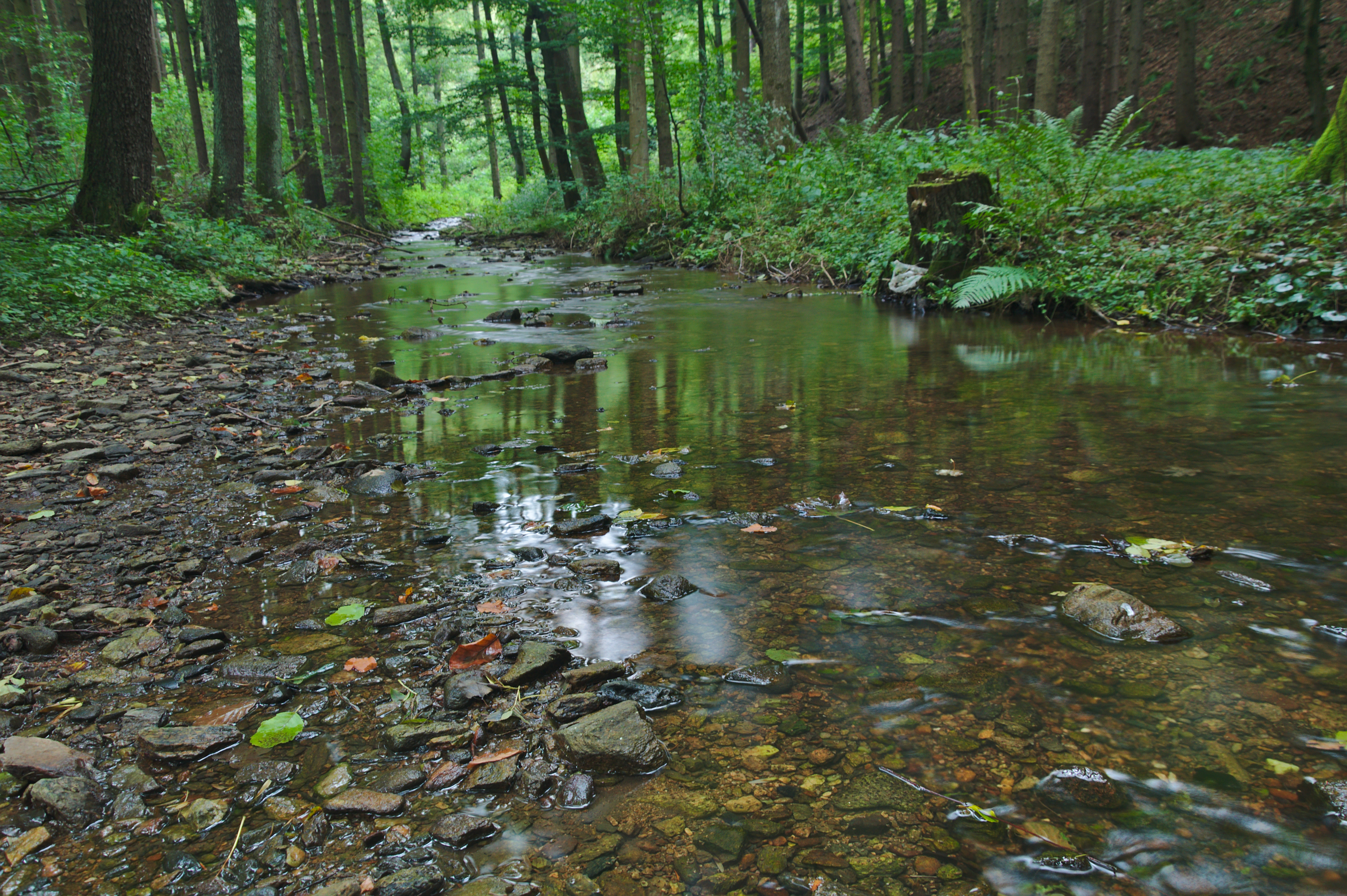 Potok Besének, okres Brno-venkov